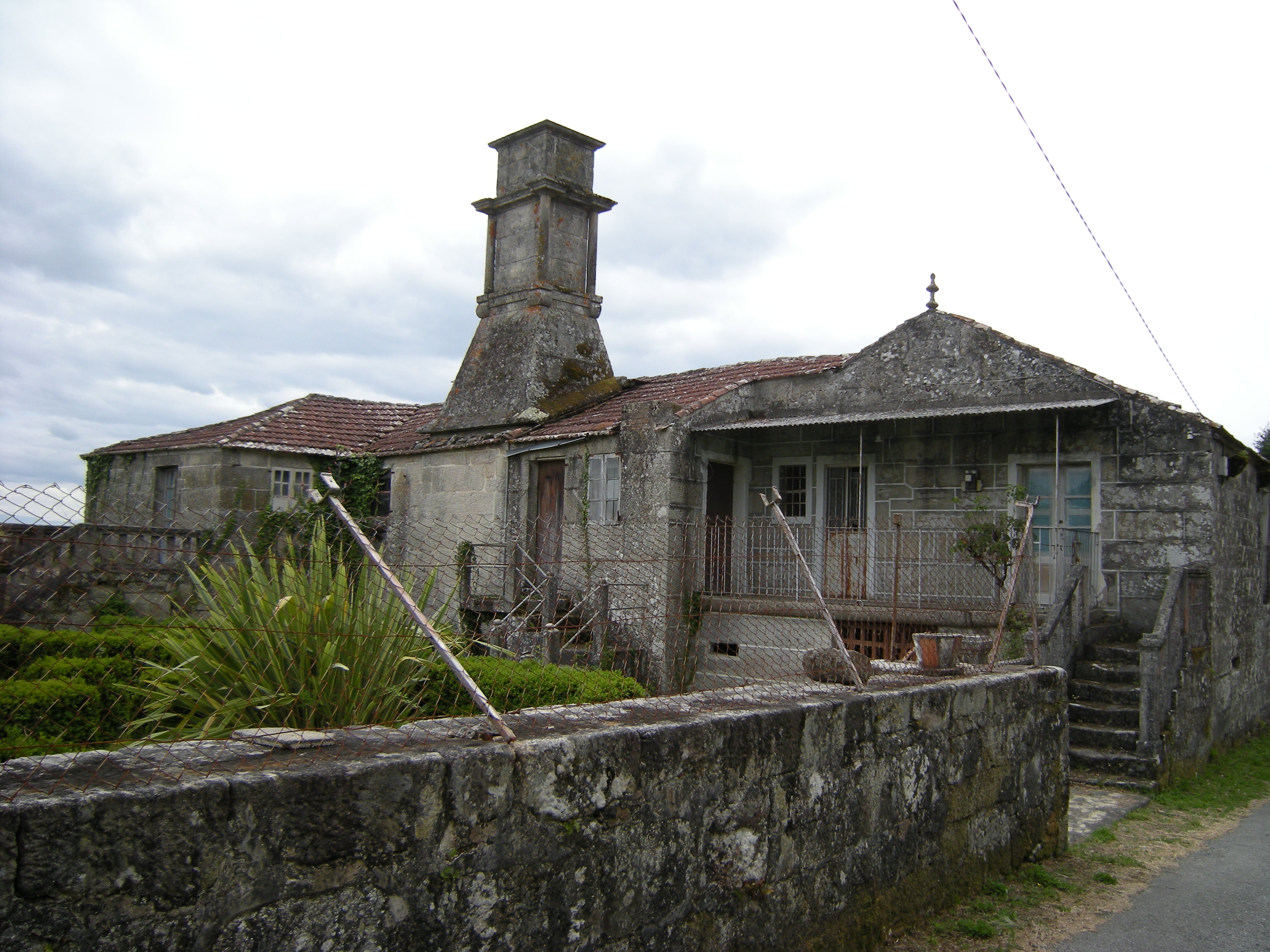 Pazo de Banga, O Carballiño